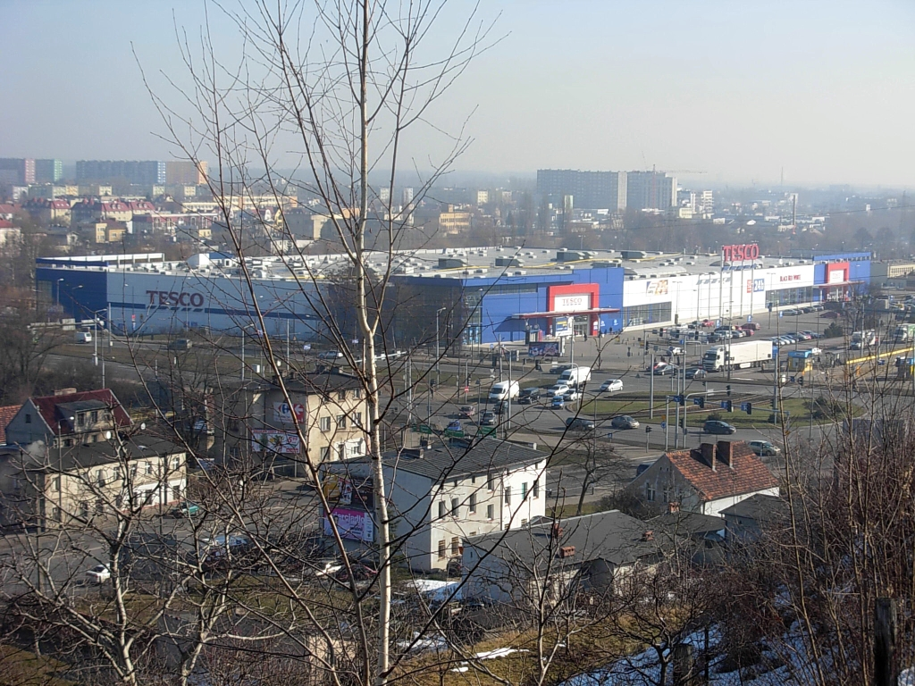 Rondo Toruńskie, Tesco widoczne ze Zbocza Bydgoskiego